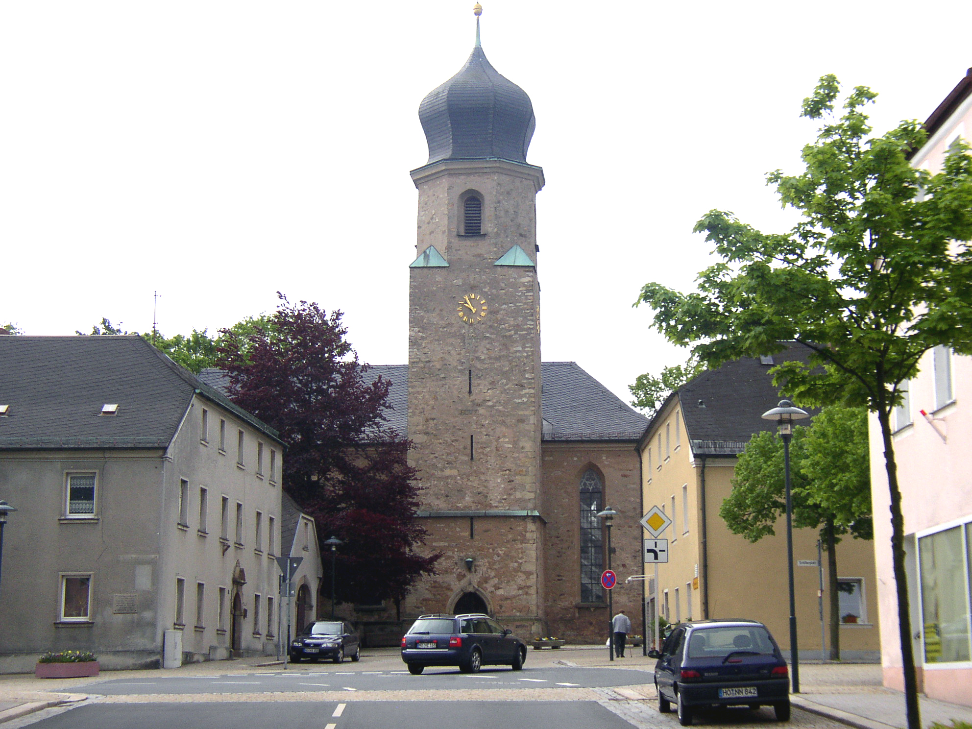 Rehau Church